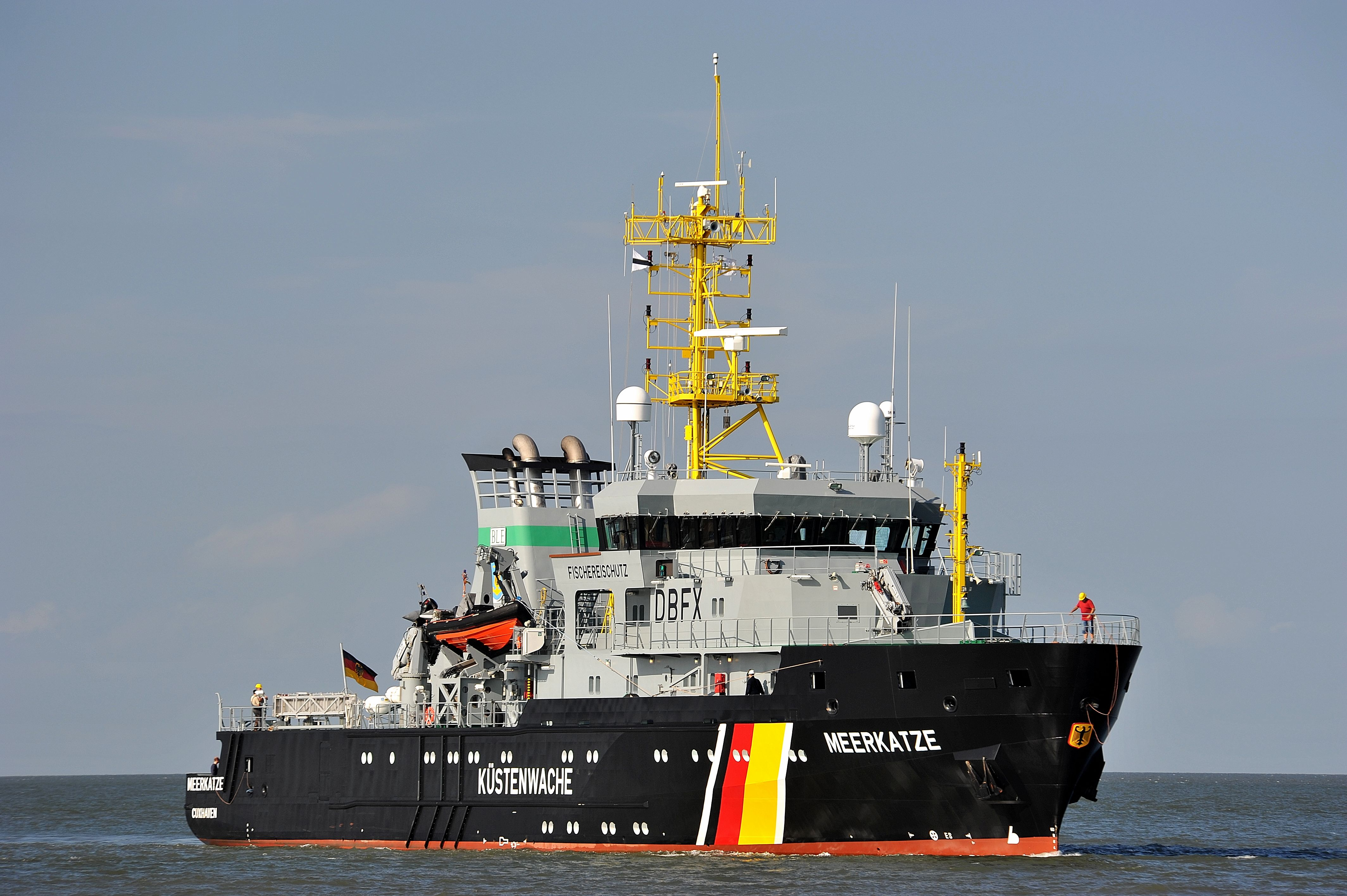 Von See kommend vor Cuxhaven